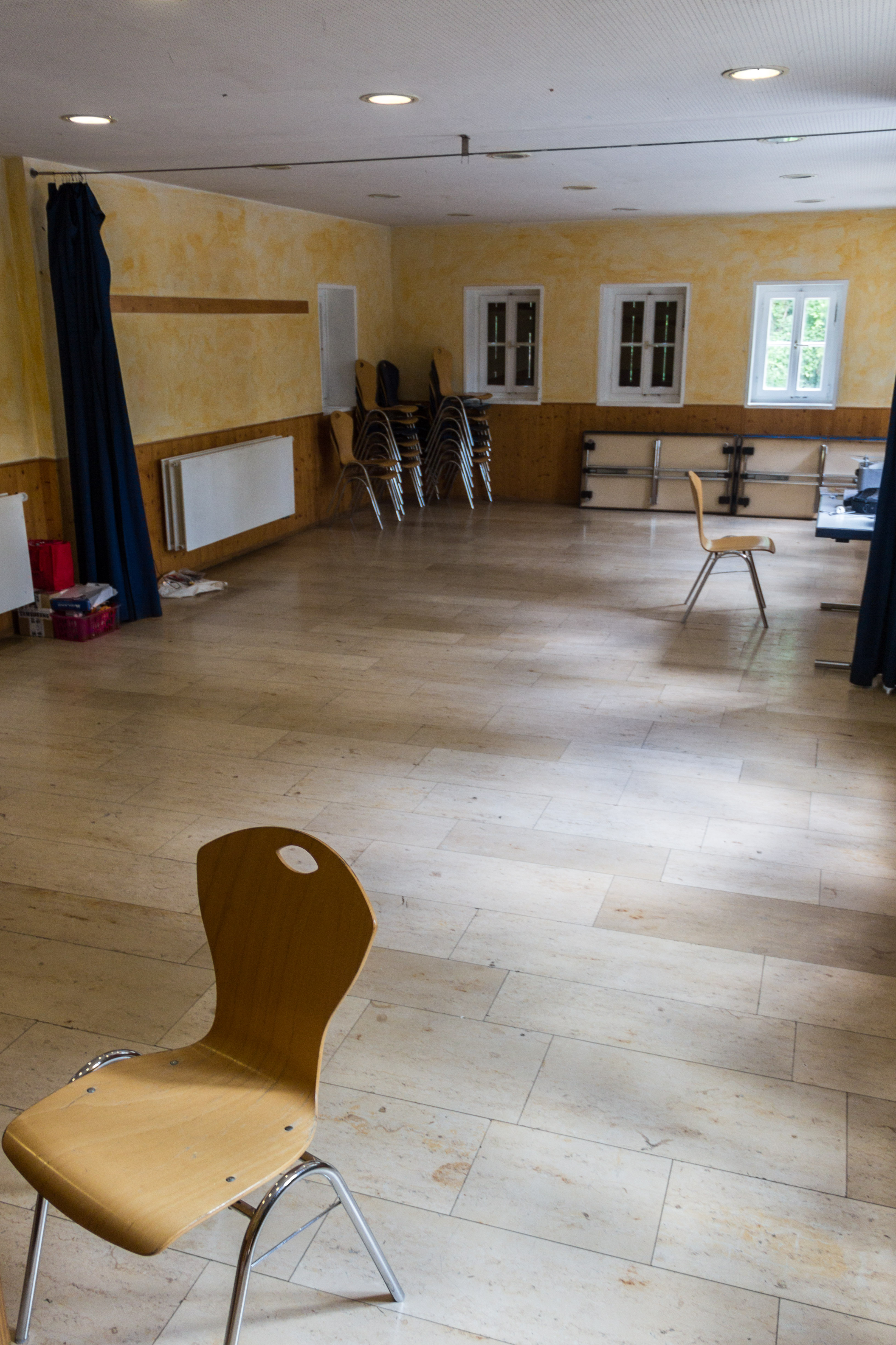 Ebermannstadt, Breitenbach, Pfadfinderhaus Lindersberg, Innnenansicht